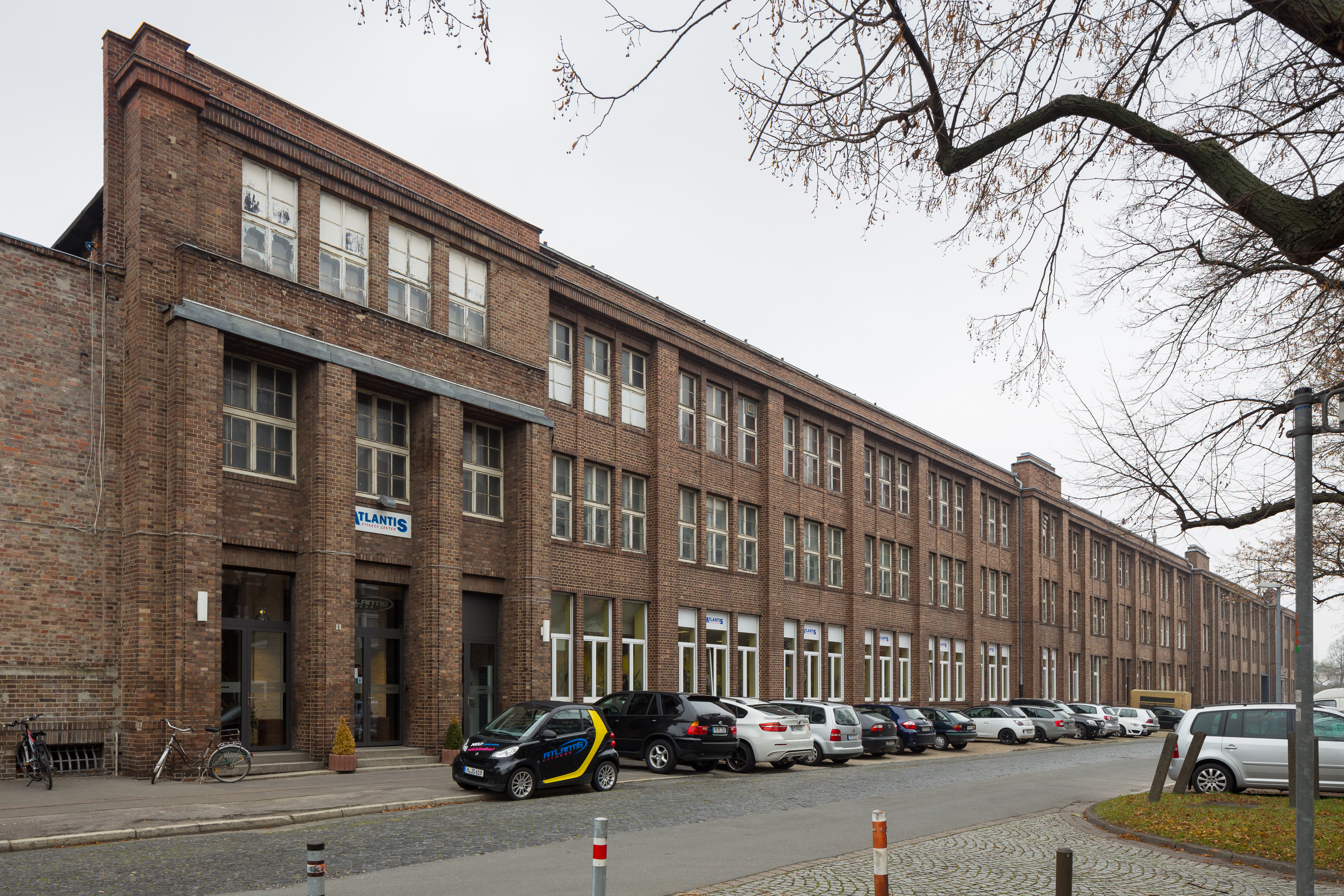 Früheres, repräsentatives Verwaltungsgebäude der Hannoverschen Waggonfabrik (HAWA) an der Straße Göttinger Hof im Stadtteil Oberricklingen von Hannover. Das Gebäude wurde 1919 errichtet. Es folgte in seiner Archtitektur den Prinzipien von Peter Behrens, der einige Werkshallen für die HAWA entworfen hatte.